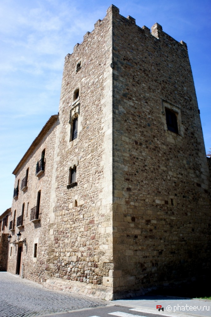 Замок Вилафортуна, Камбрилс